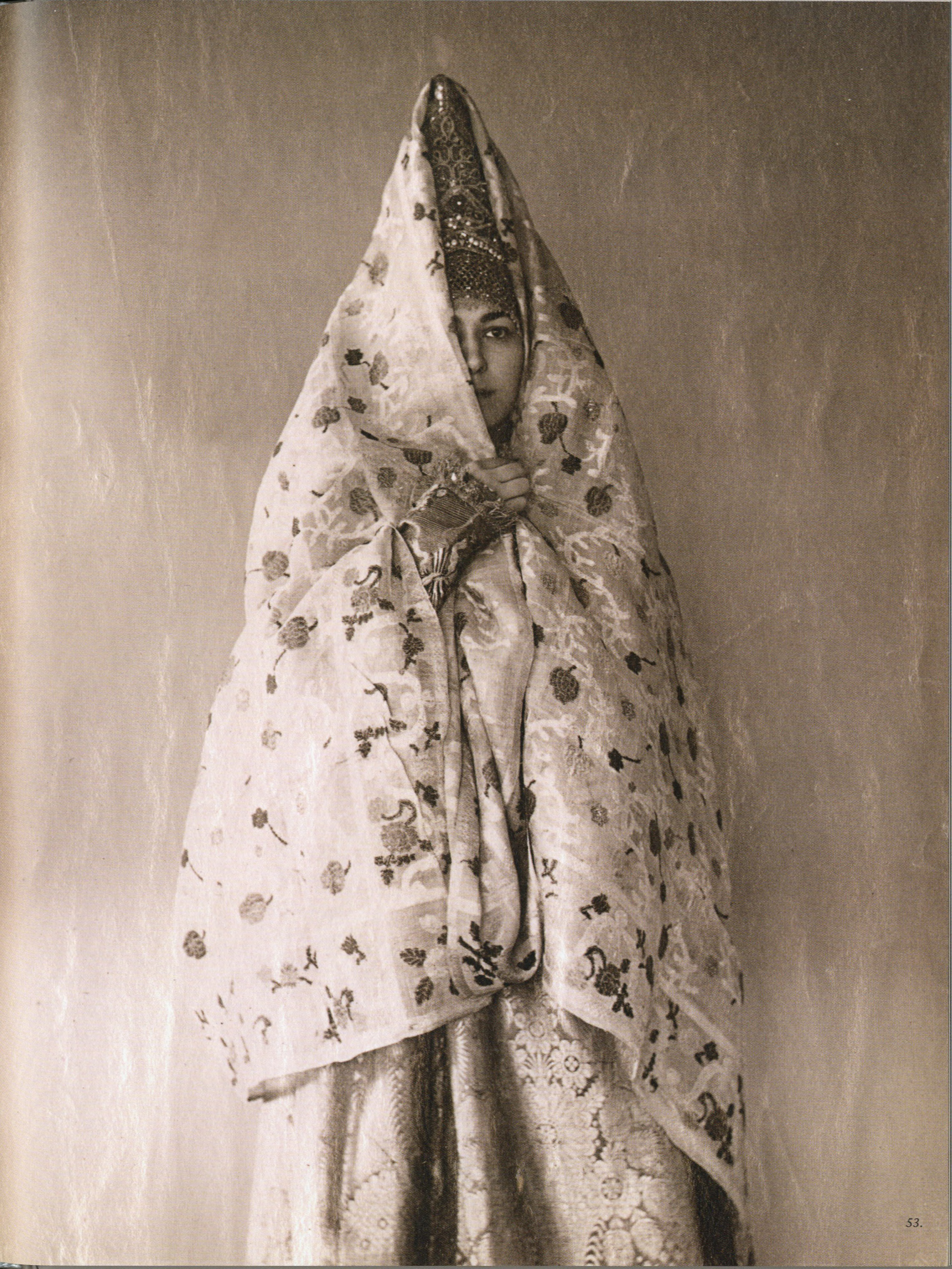 Фотографии коллекции Шабельских из собрания российского этнографического музея